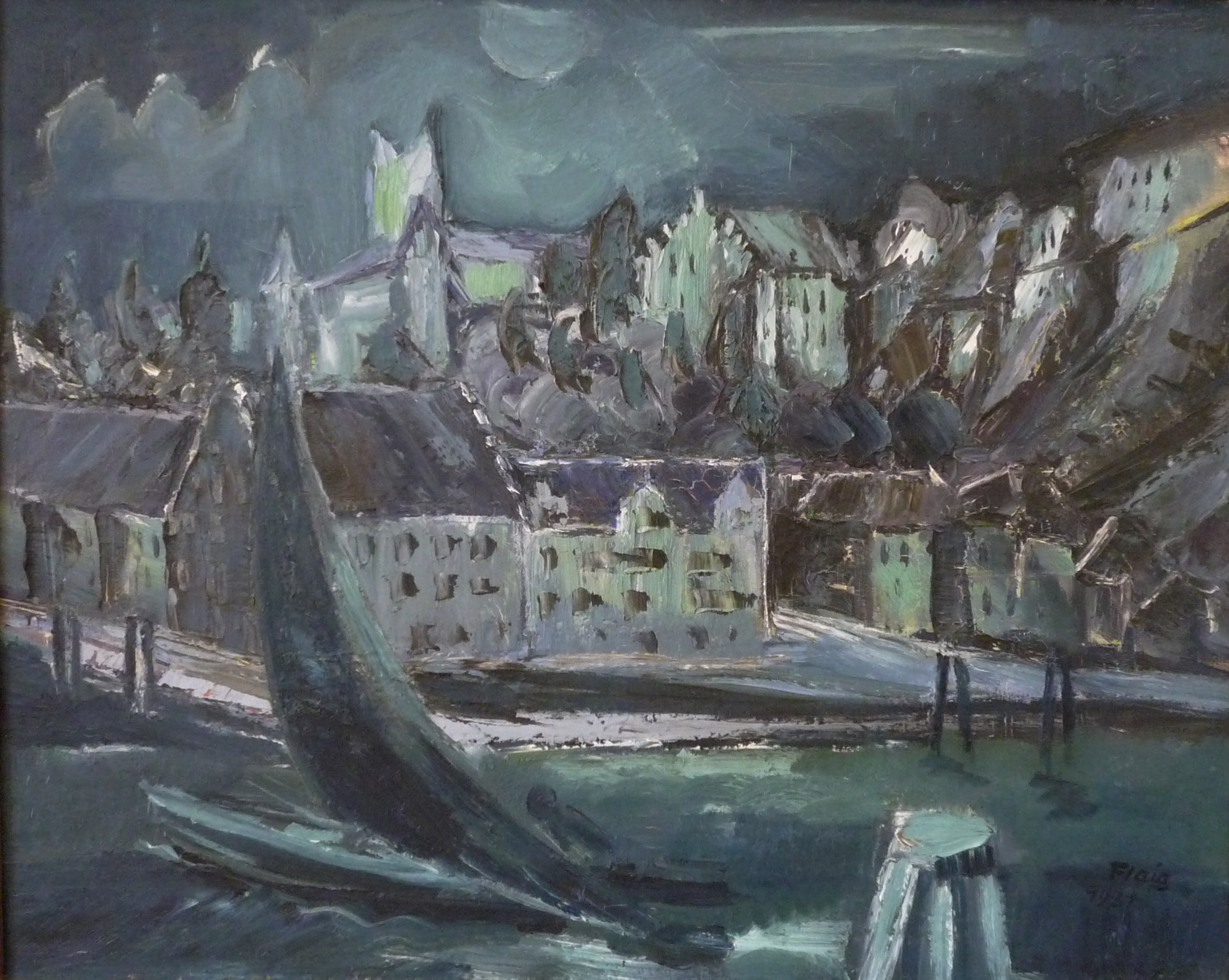 Blick vom Hafen auf das Alte und Teile des Neuen Schlosses Meersburg